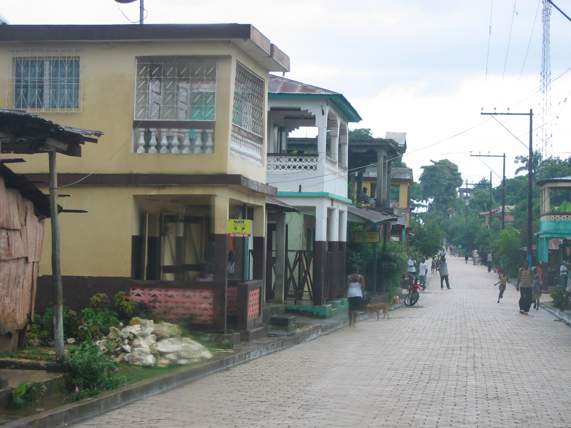 Streets, Dame-Marie, Haiti